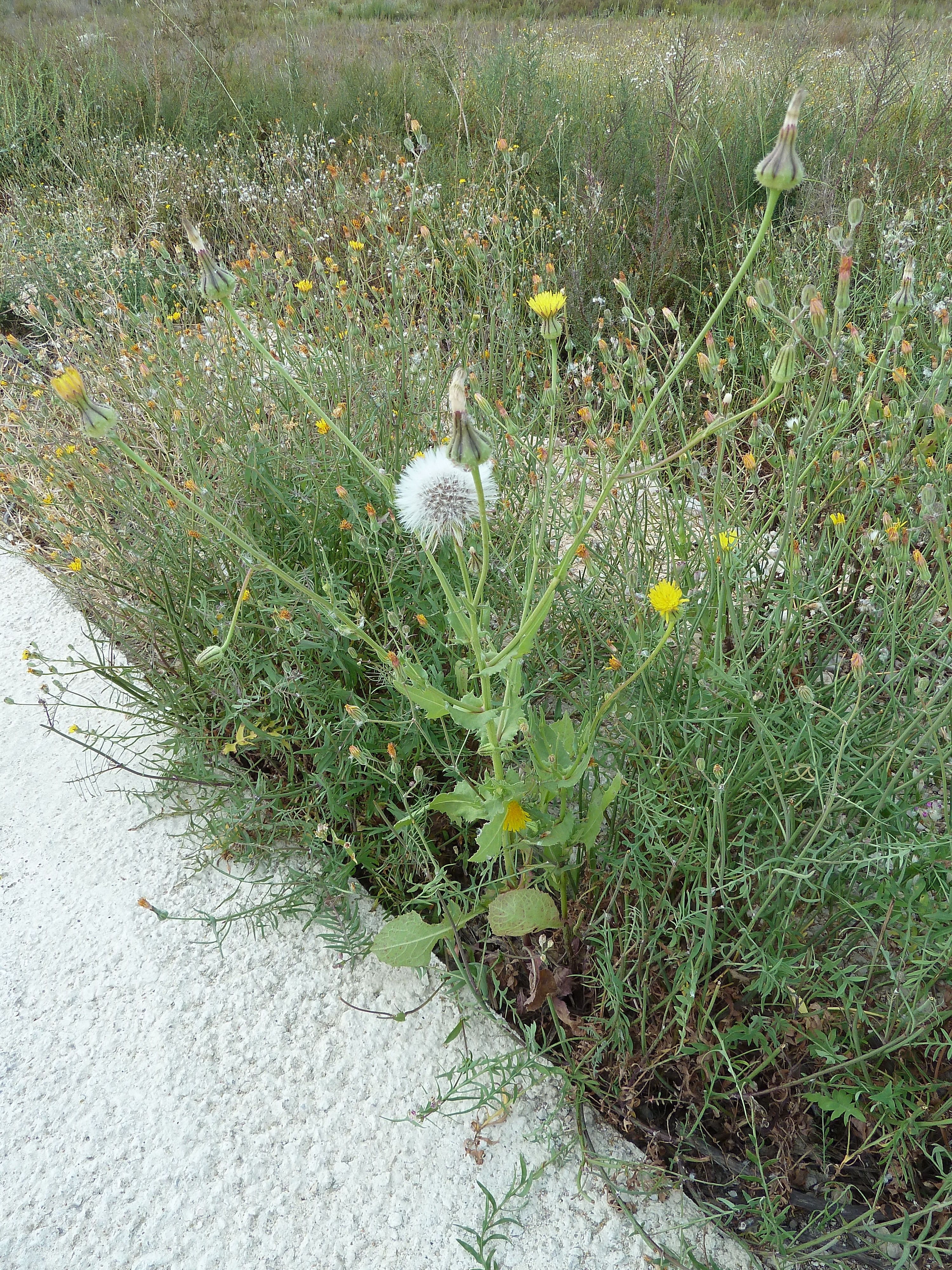 Urospermum picroides : Vista general con capítulos en diversos estados de desarrollo. Noten las hojas basales liradas y las caulinatres abrazadoras y auriculadas. - Camino de Granja de Rocamora a Catral, Albatera (Alicante, España).